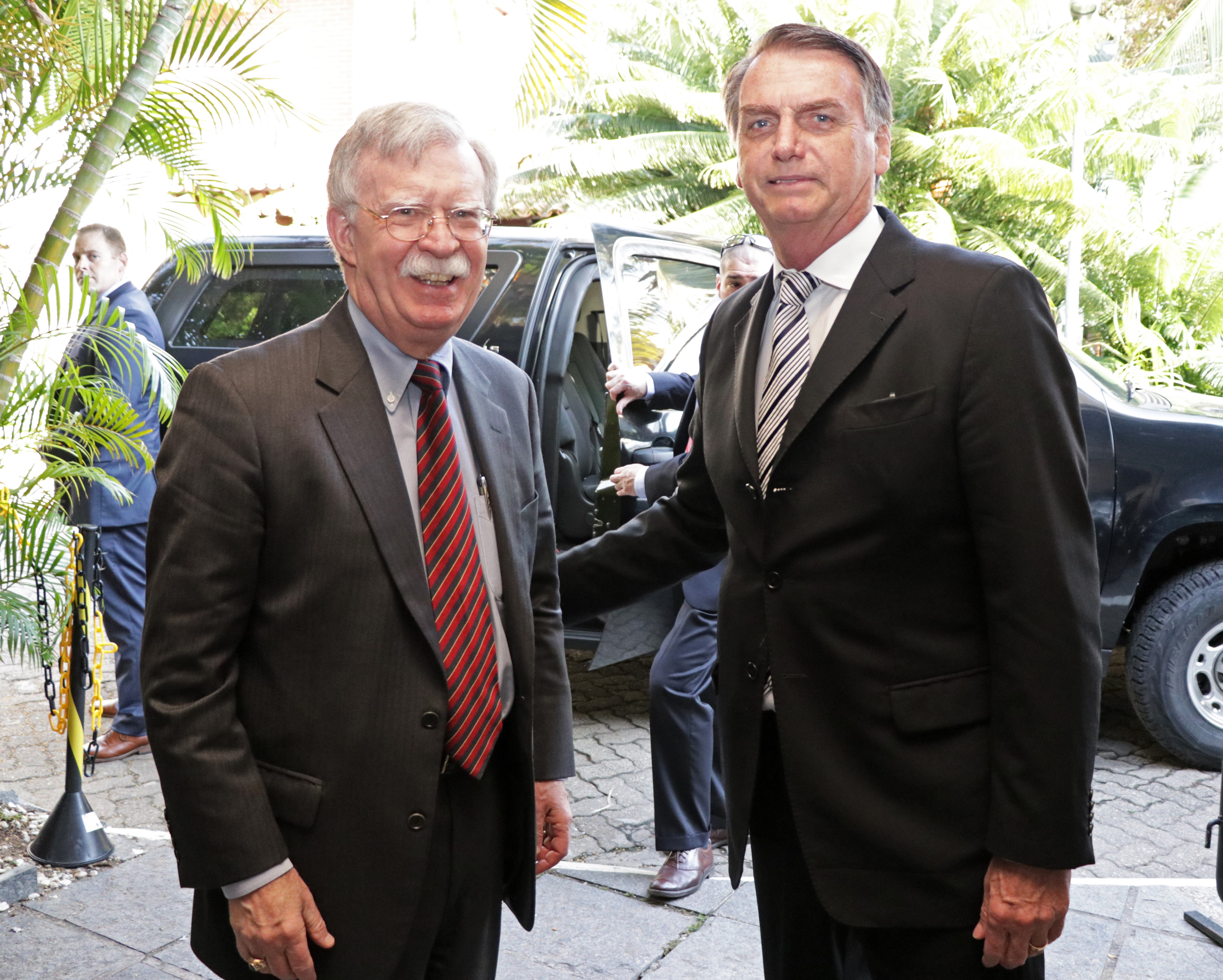 Encontro do Assessor de Segurança Nacional dos EUA John Bolton com Presidente Eleito do Brasil Jair Bolsonaro Presidente Eleito do Brasil Jair Bolsonaro recebe o embaixador John Bolton, assessor de segurança nacional dos EUA, no Rio de Janeiro. / President-elect Jair Bolsonaro receives Ambassador John Bolton, U.S. National Security Advisor, in Rio de Janeiro. (Photo: U.S. Consulate in Rio).